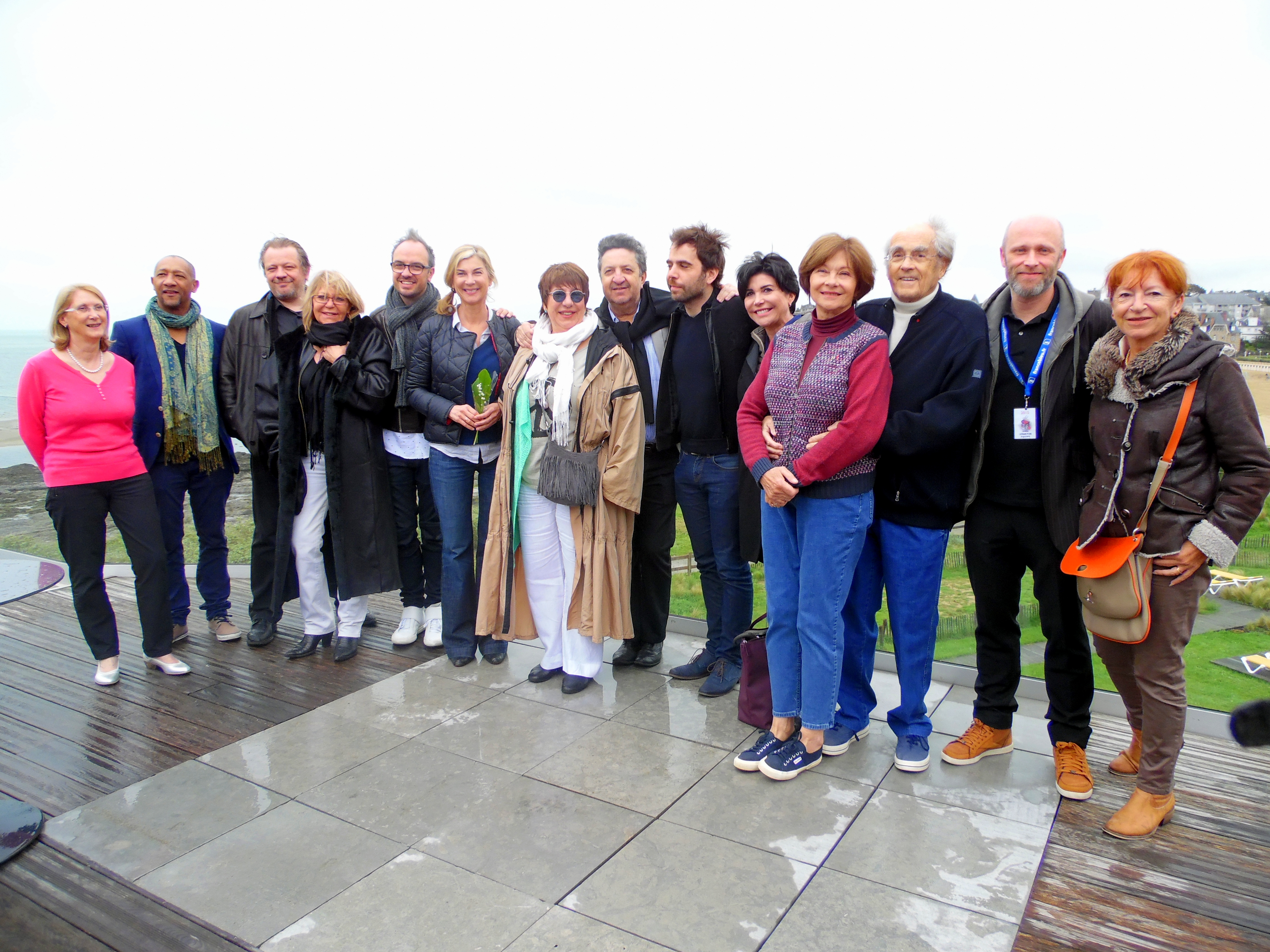 Jury 2015 du Dinard Comedy Festival avec Édouard Montoute, Françoise Ménidrey, Jarry, Michèle Laroque, Annie Grégorio, Gérard Moulévrier, Sébastien Castro, Liane Foly, Macha Méril, Michel Legrand, Xavier Lebreton et Sylvie Pautrel.